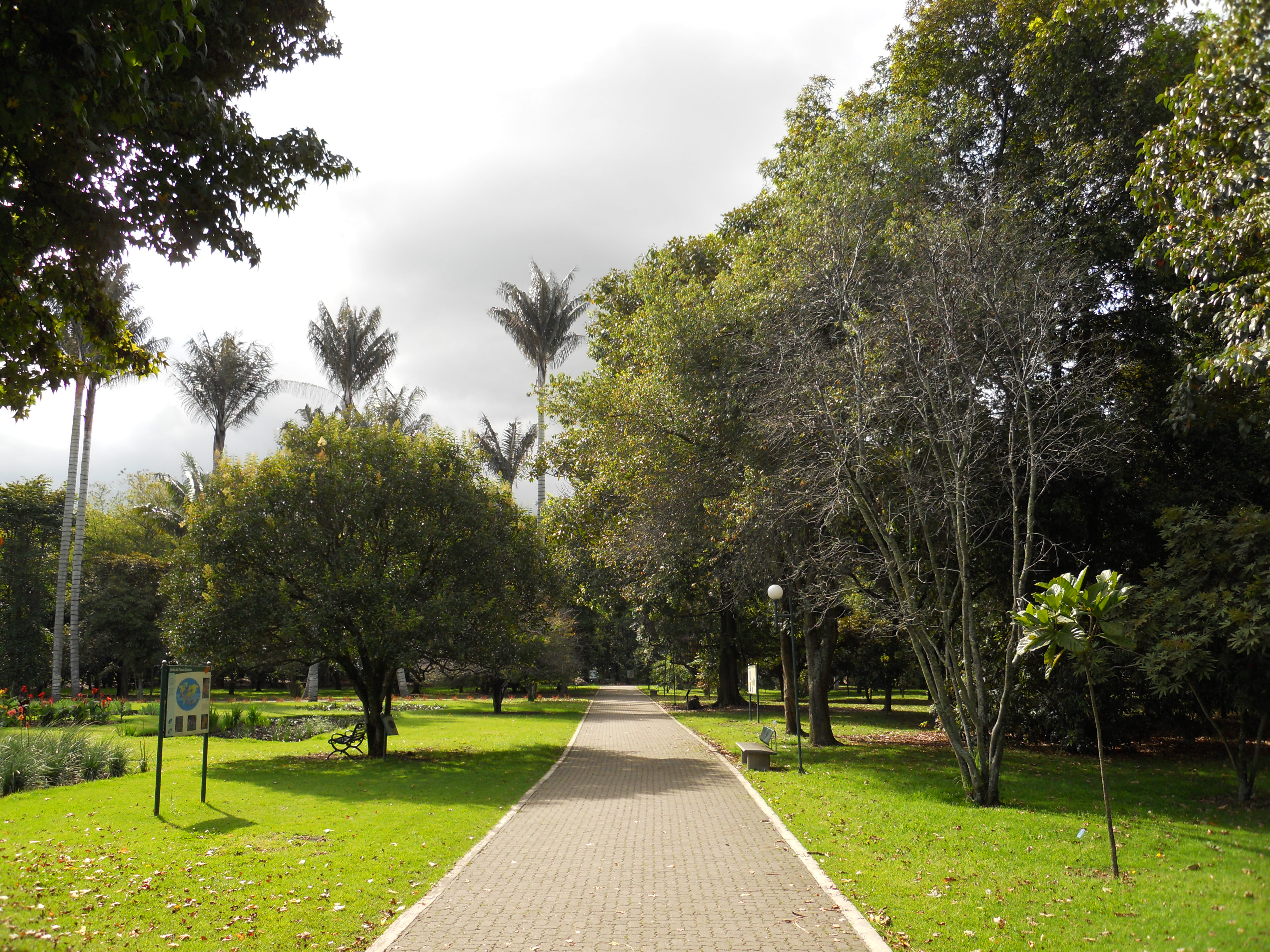 Palmas del Quindío en el Jardín Botánico de Bogotá.